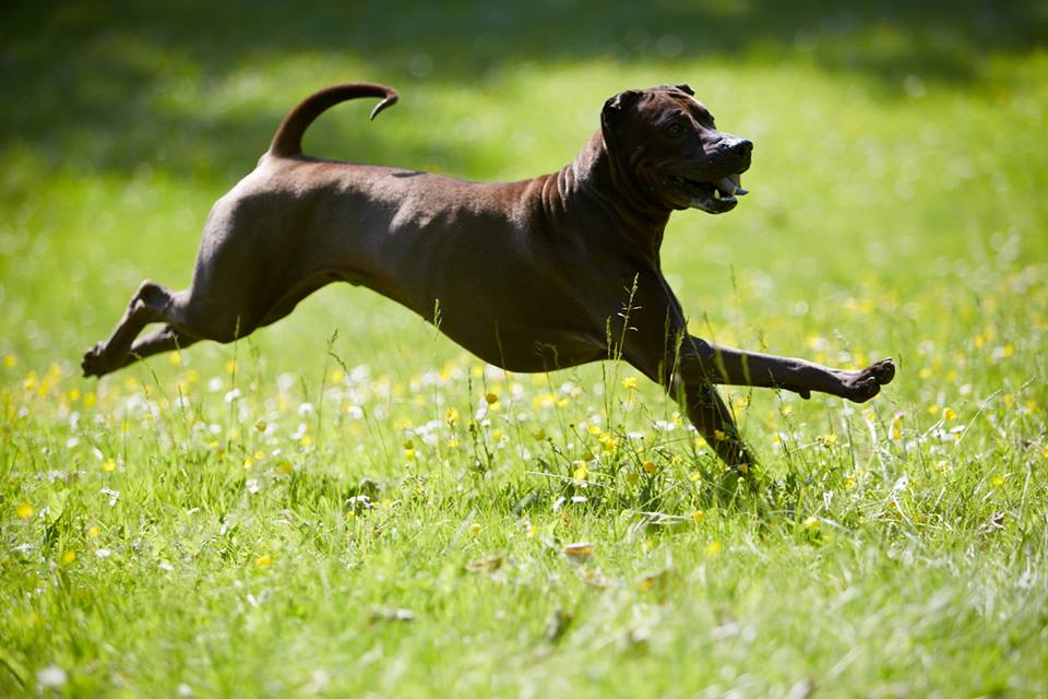 Traditioneller Sharpei